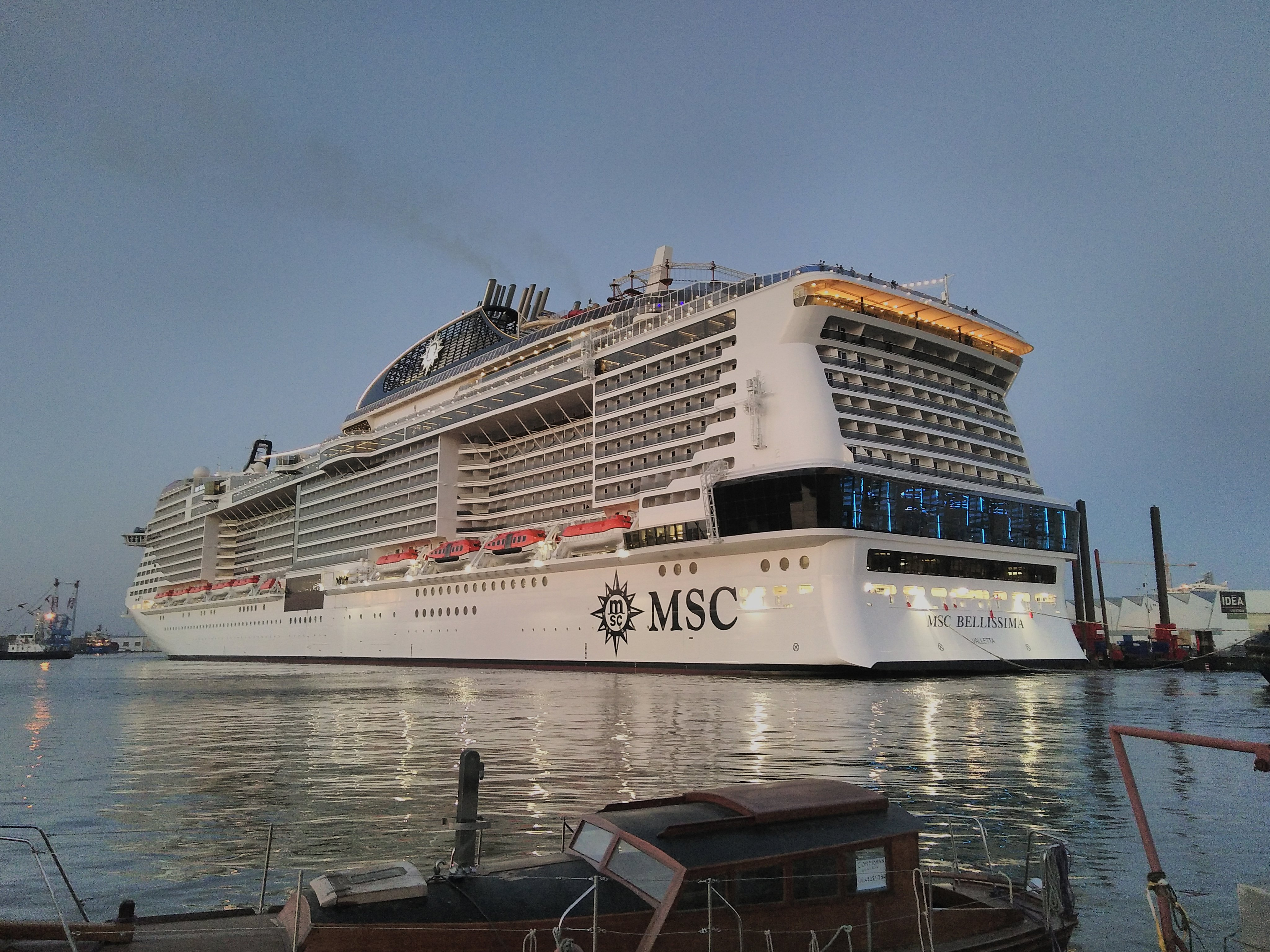 MSC Bellissima dans le bassin de Penhoët la veille de son départ des chantiers de Saint-Nazaire